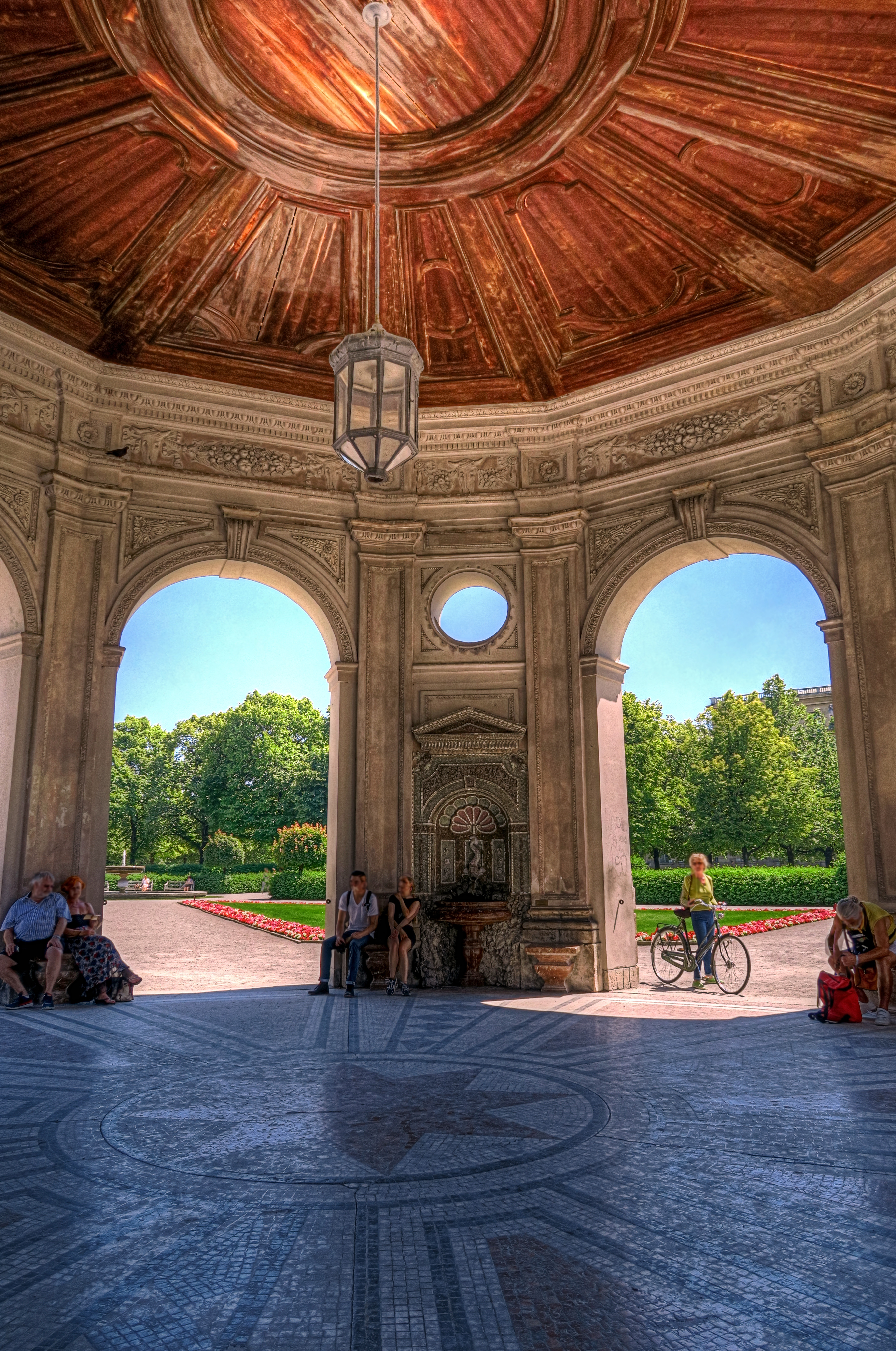 Deutschland, Bayern, München, Altstadt, Hofgarten, Diana-Tempel